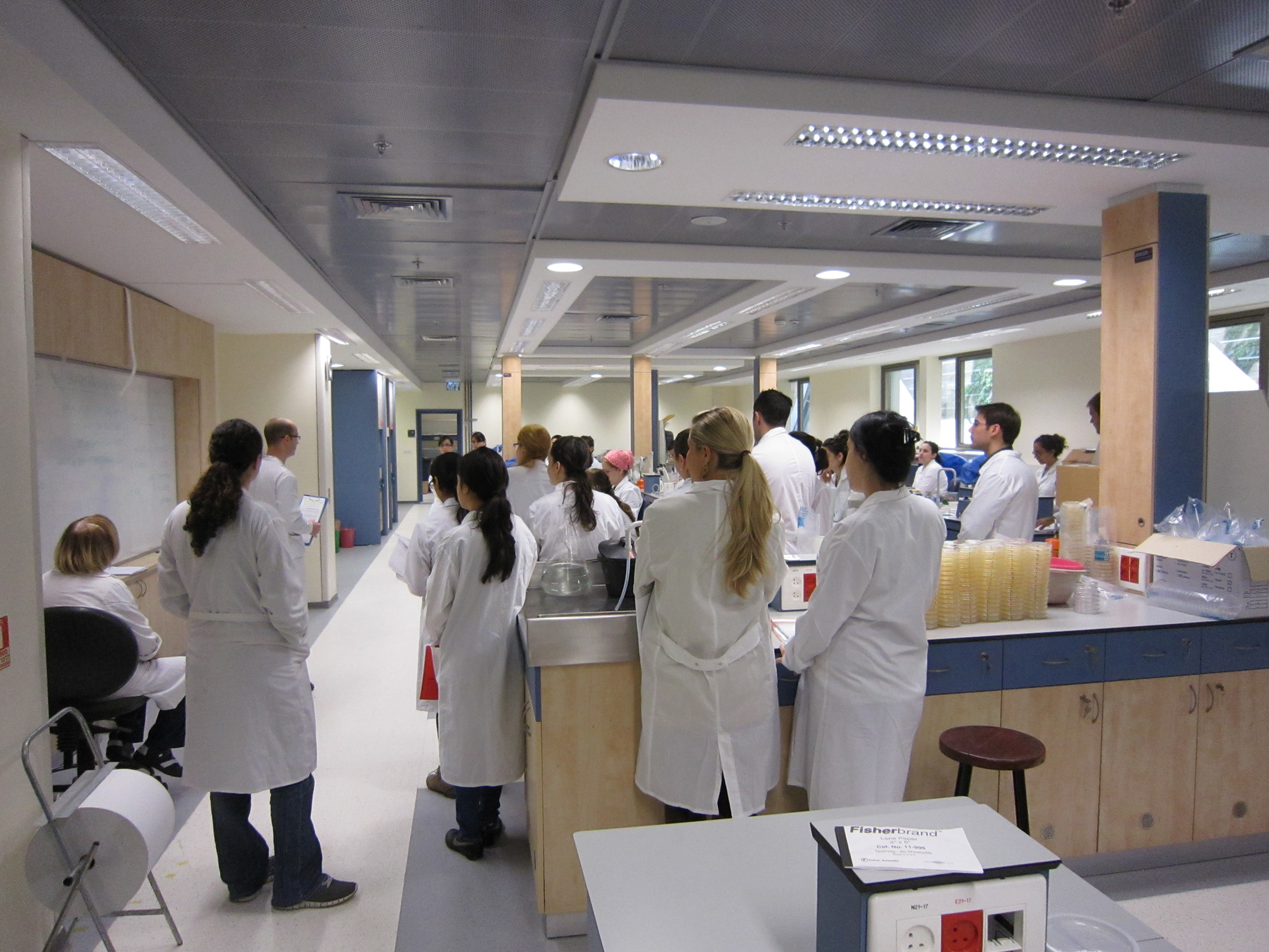 בניין הפקולטה להנדסת ביוטכנולוגיה ומזון